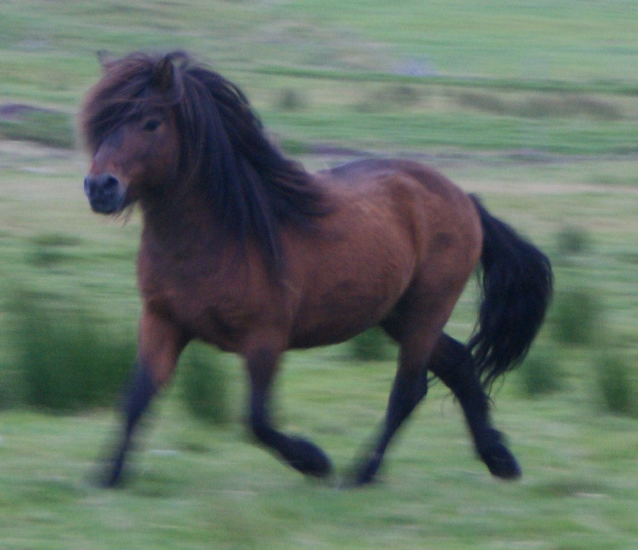 Hingsten Tambar af racen færøsk hest